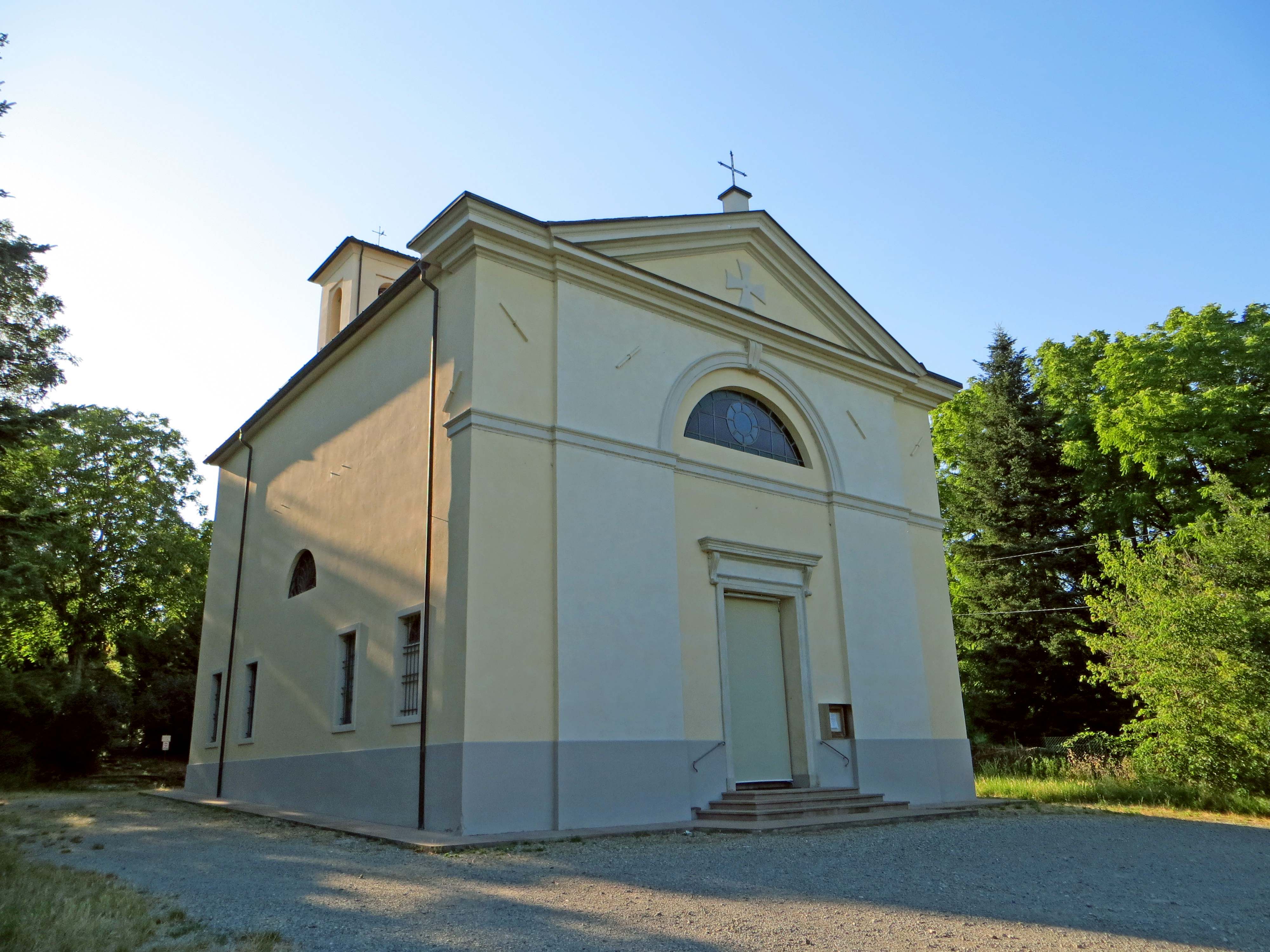 Chiesa di San Martino (Arola, Langhirano) - facciata e lato nord